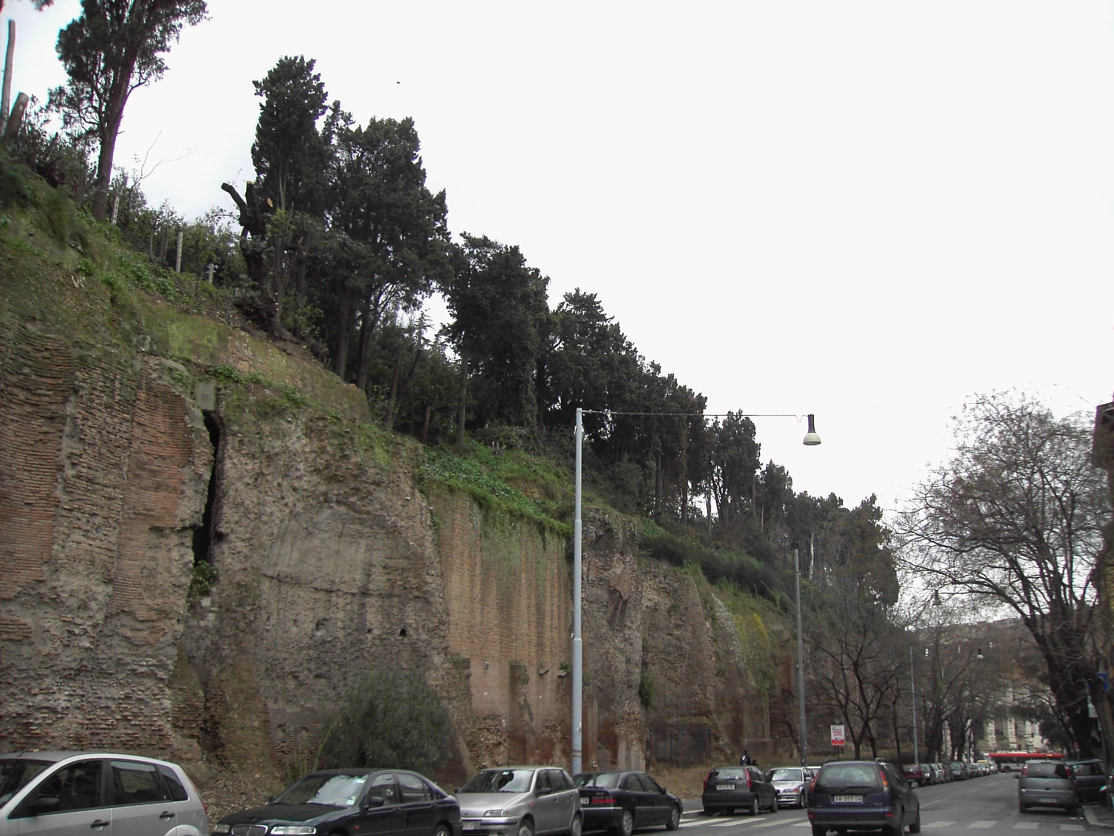 Roma, via Claudia: sostruzioni del tempio del Divo Claudio